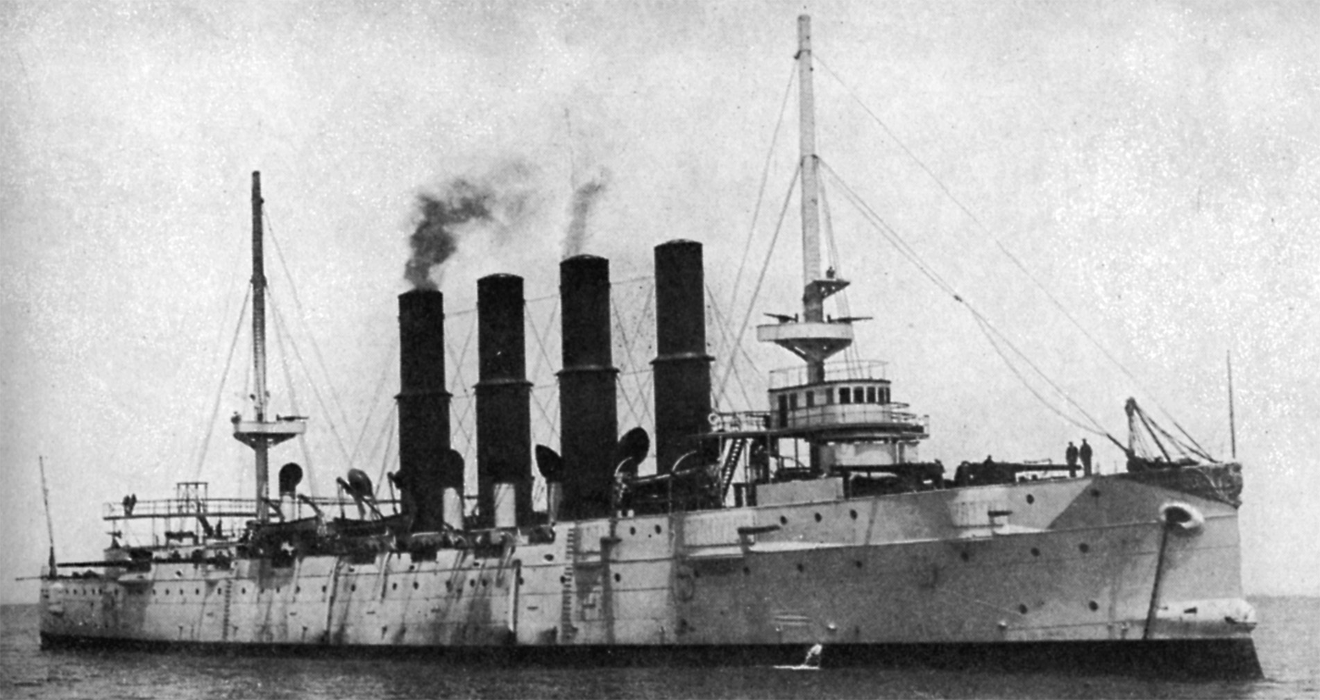 Russian Crusier Variag